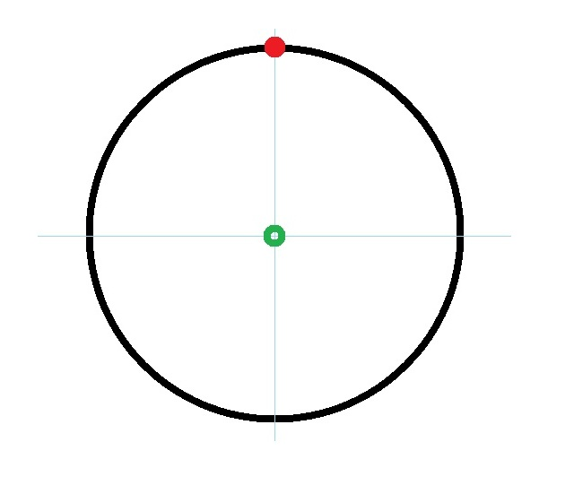 کوردی: RPM